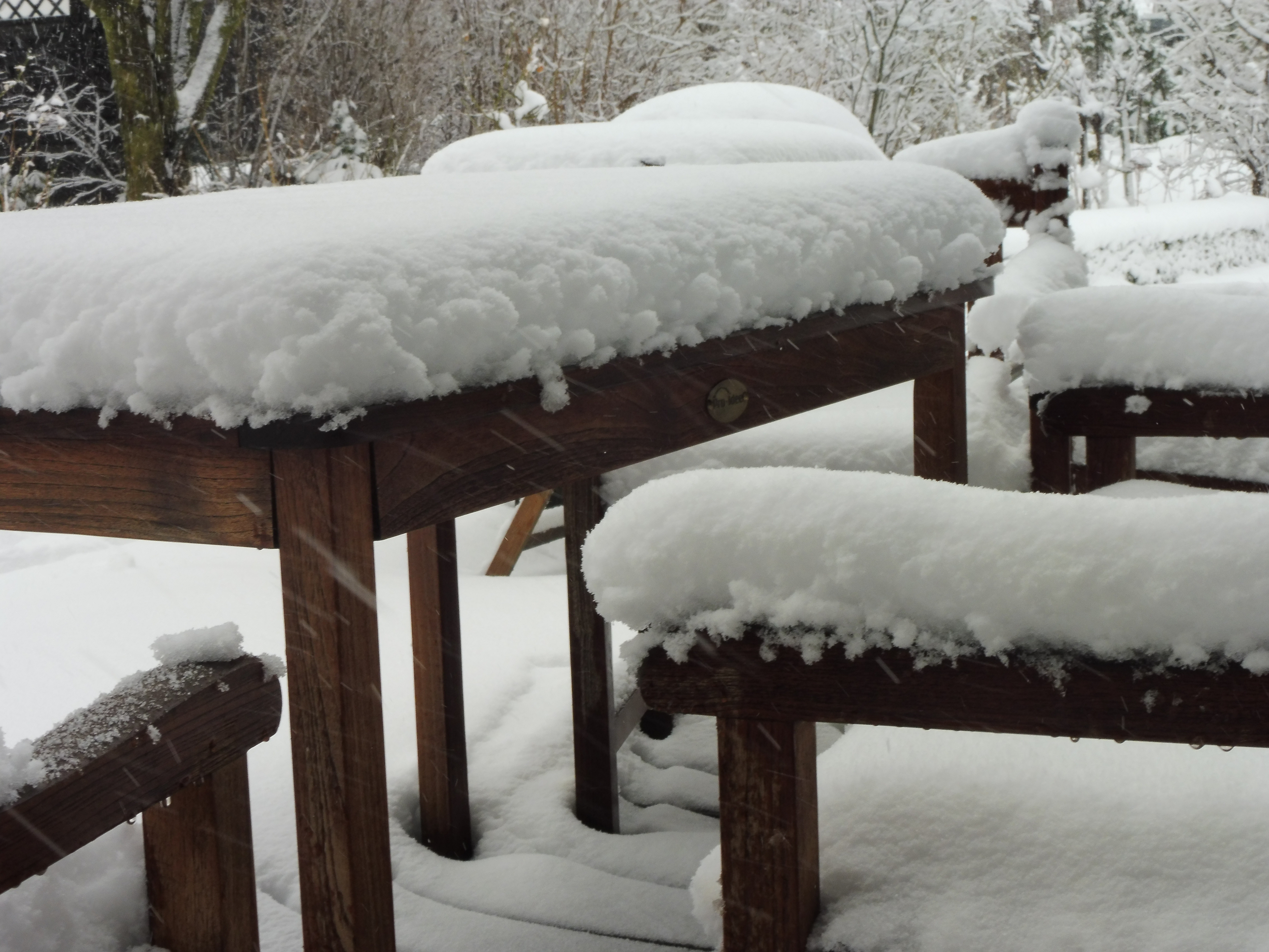 Überschneite Gartenmöbel am Ostersonntag 2018 in Mecklenburg